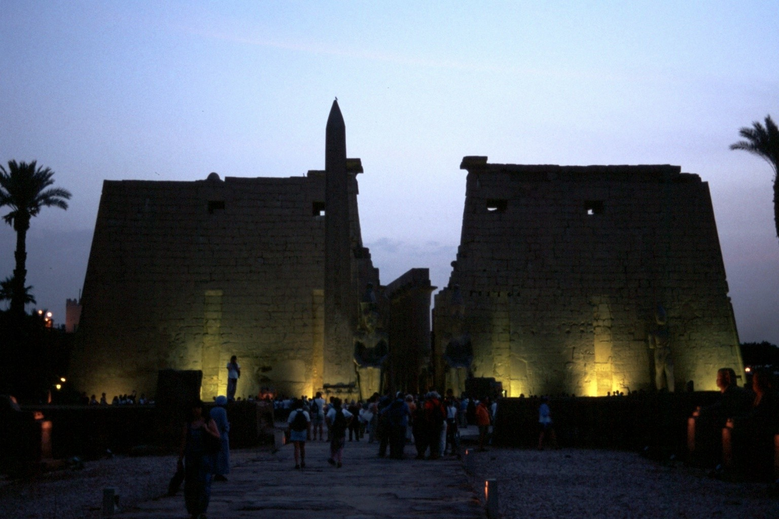 Luxor Temple